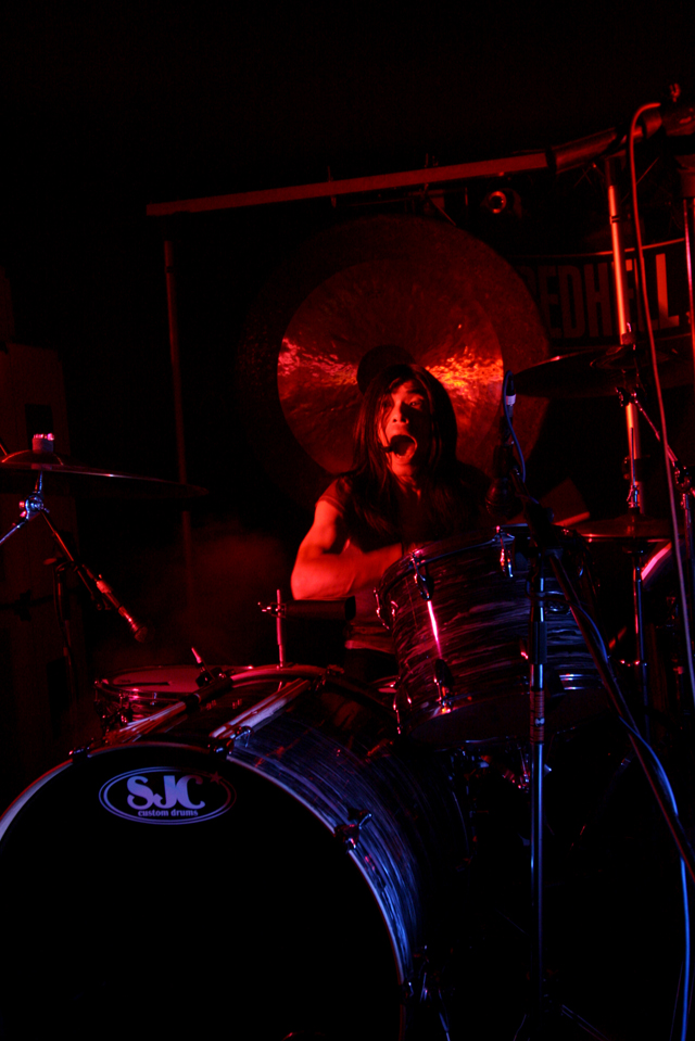 Boris actuando en Budapest en mayo de 2008.